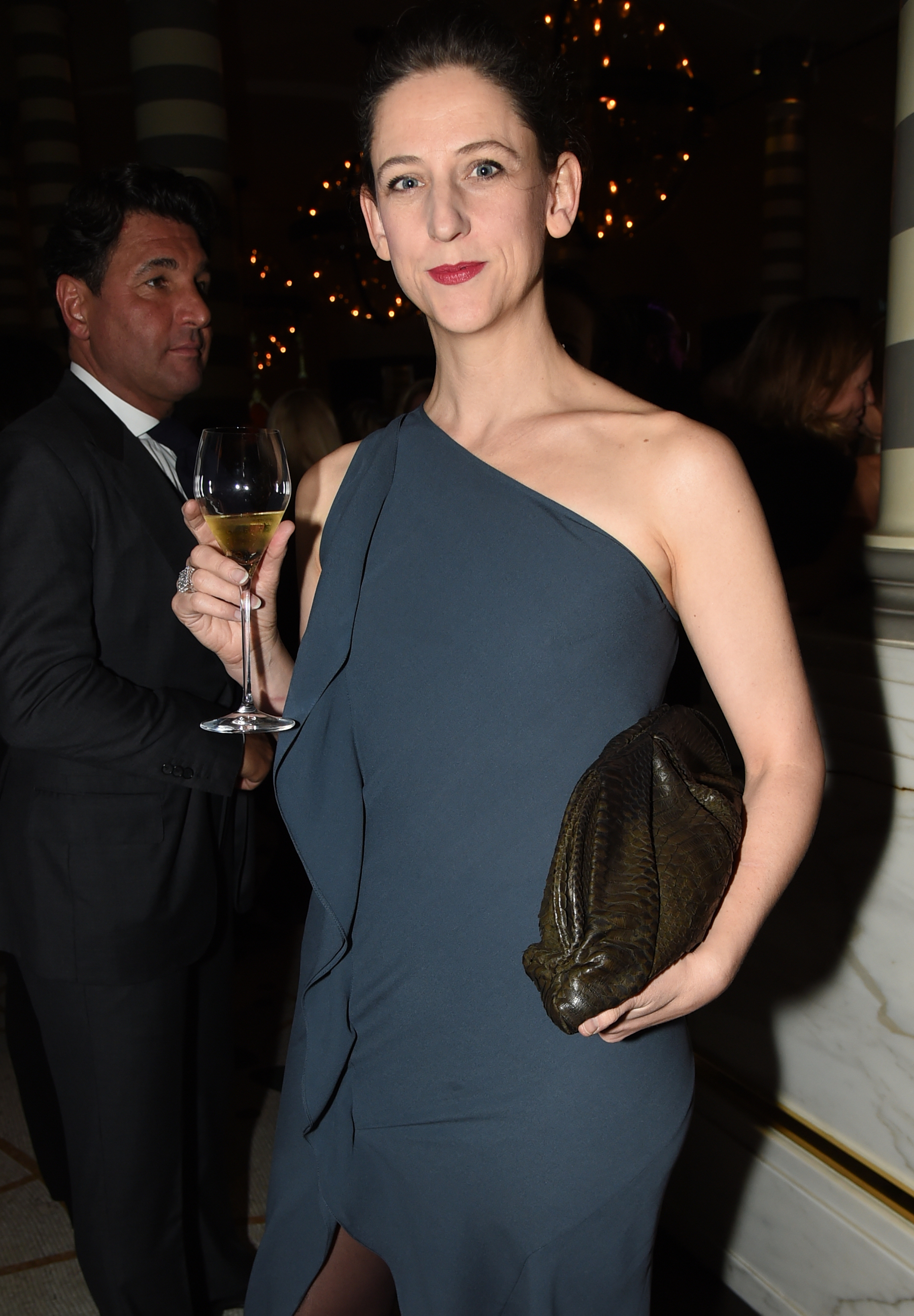 Fashion designer Maria Grachvogel